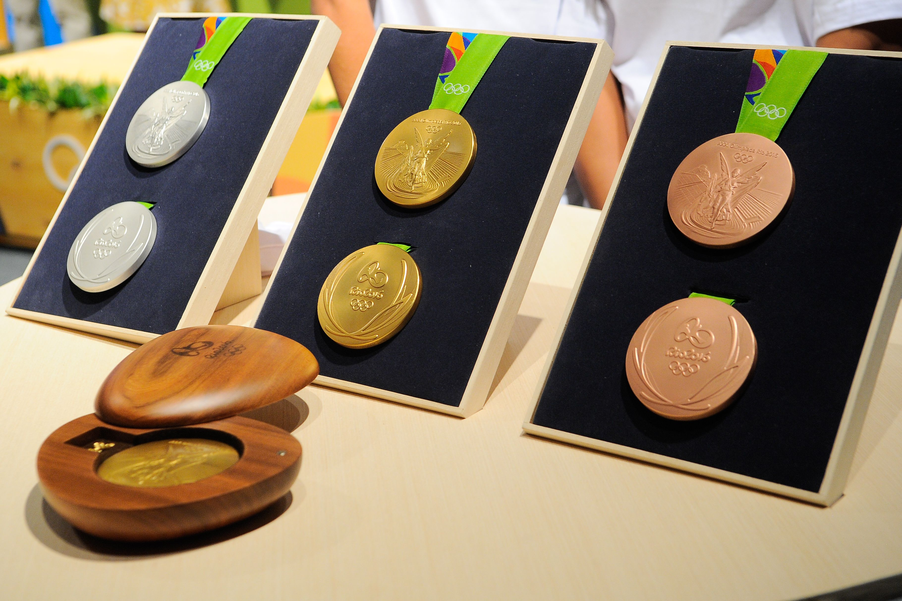 Medalhas dos Jogos Olímpicos de Verão de 2016.